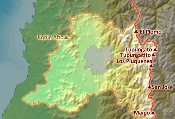 Relieve de la Región Metropolitana de Santiago, Chile, con los principales cerros. En café oscuro, cimas en la cordillera de los Andes, en café claro, los de la cordillera de la Costa.